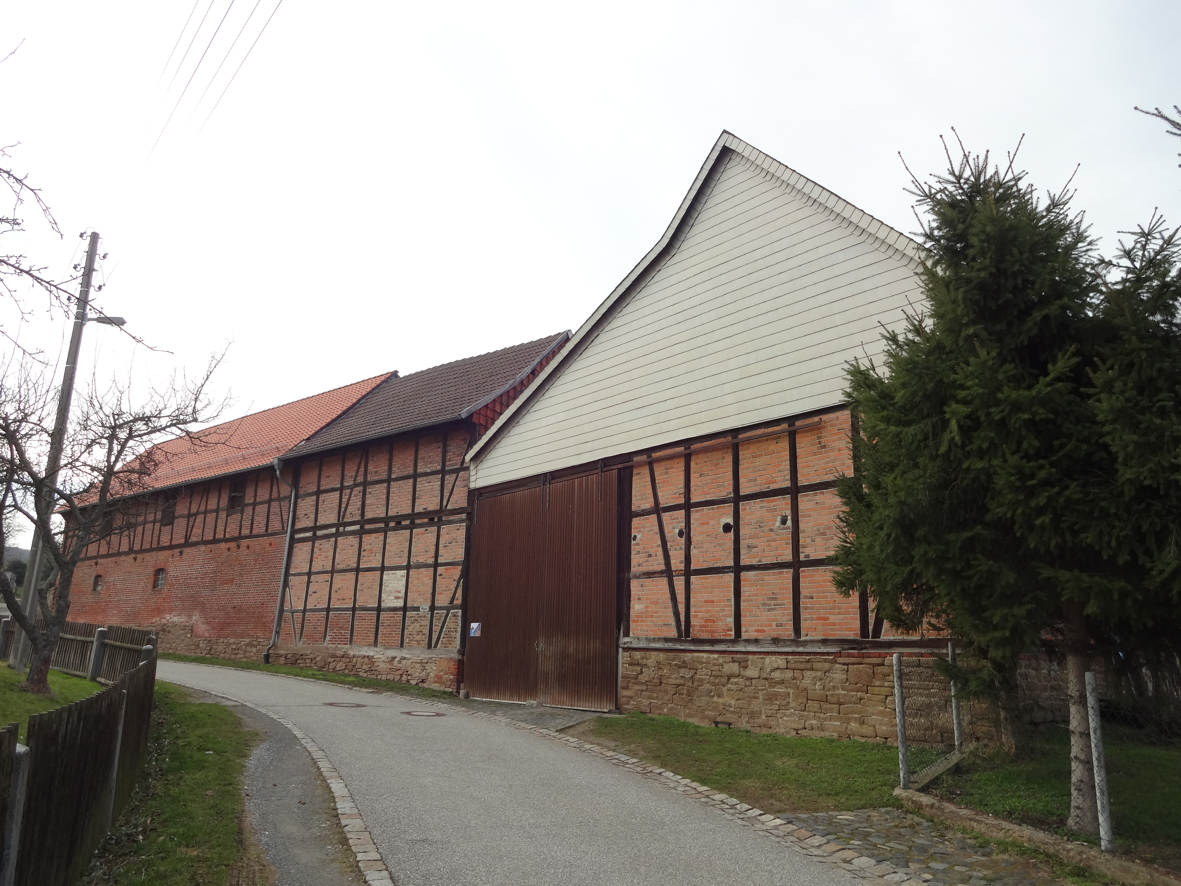 ehemaliges Kulturdenkmal Bauernhof in der Straße Winkel 8 in Benzingerode, Ortsteil von Wernigerode